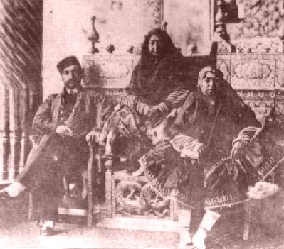 عکسی از مهد علیا، ناصرالدین شاه و عزت الدوله (پایین سمت راست).